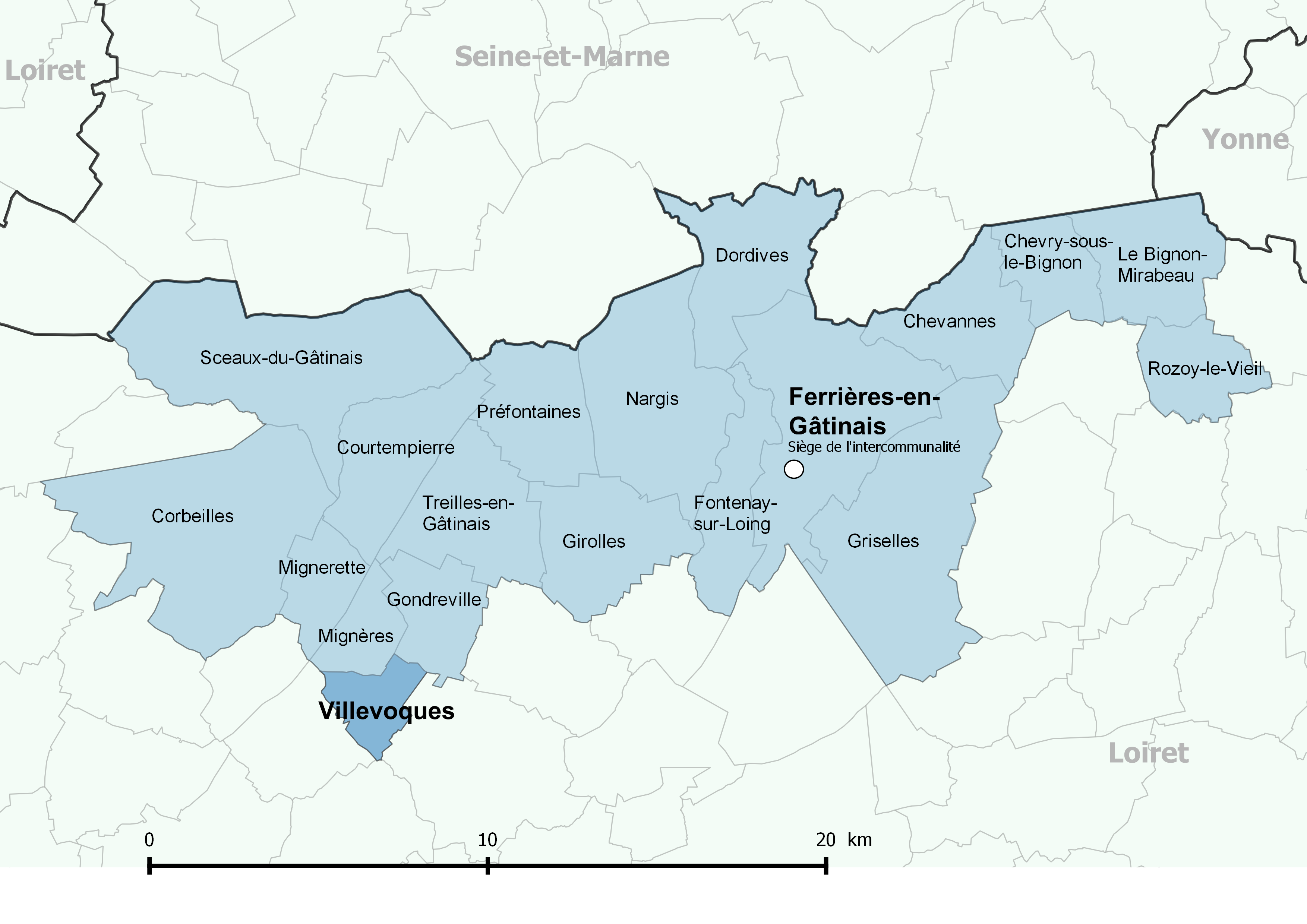 Périmètre de la communauté de communes des Quatre Vallées (Loiret) - Positionnement de la commune de Villevoques.